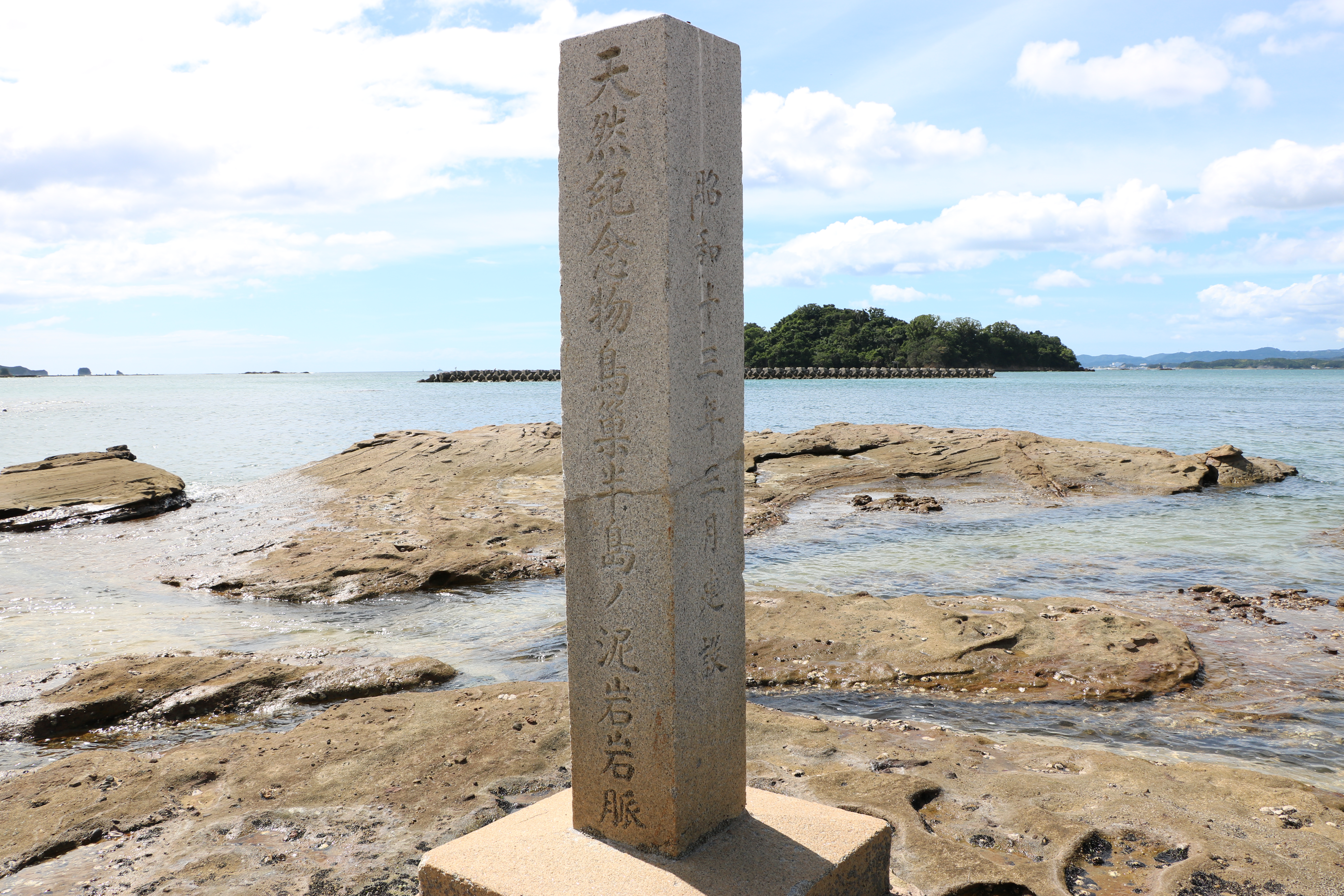 鳥巣半島の泥岩岩脈（国指定天然記念物、和歌山県田辺市）天然記念物石碑。